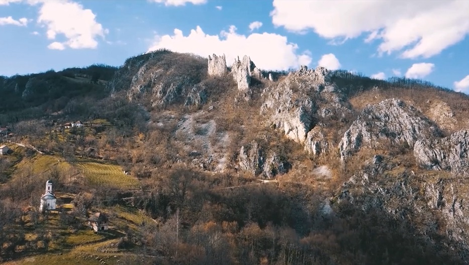 Srpski (latinica): Misište pod rogovima sokoline